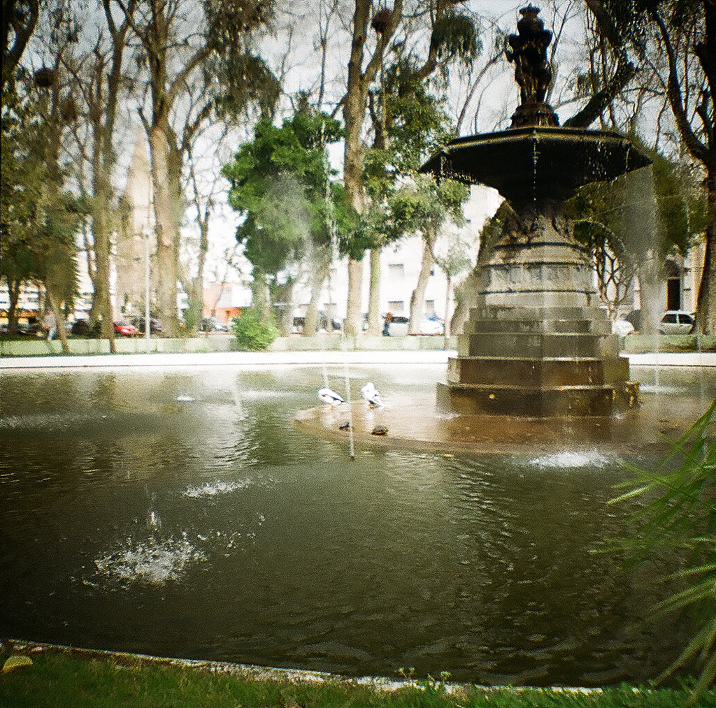 Foto do chafariz existente na Praça Tamandaré, em Rio Grande (RS)